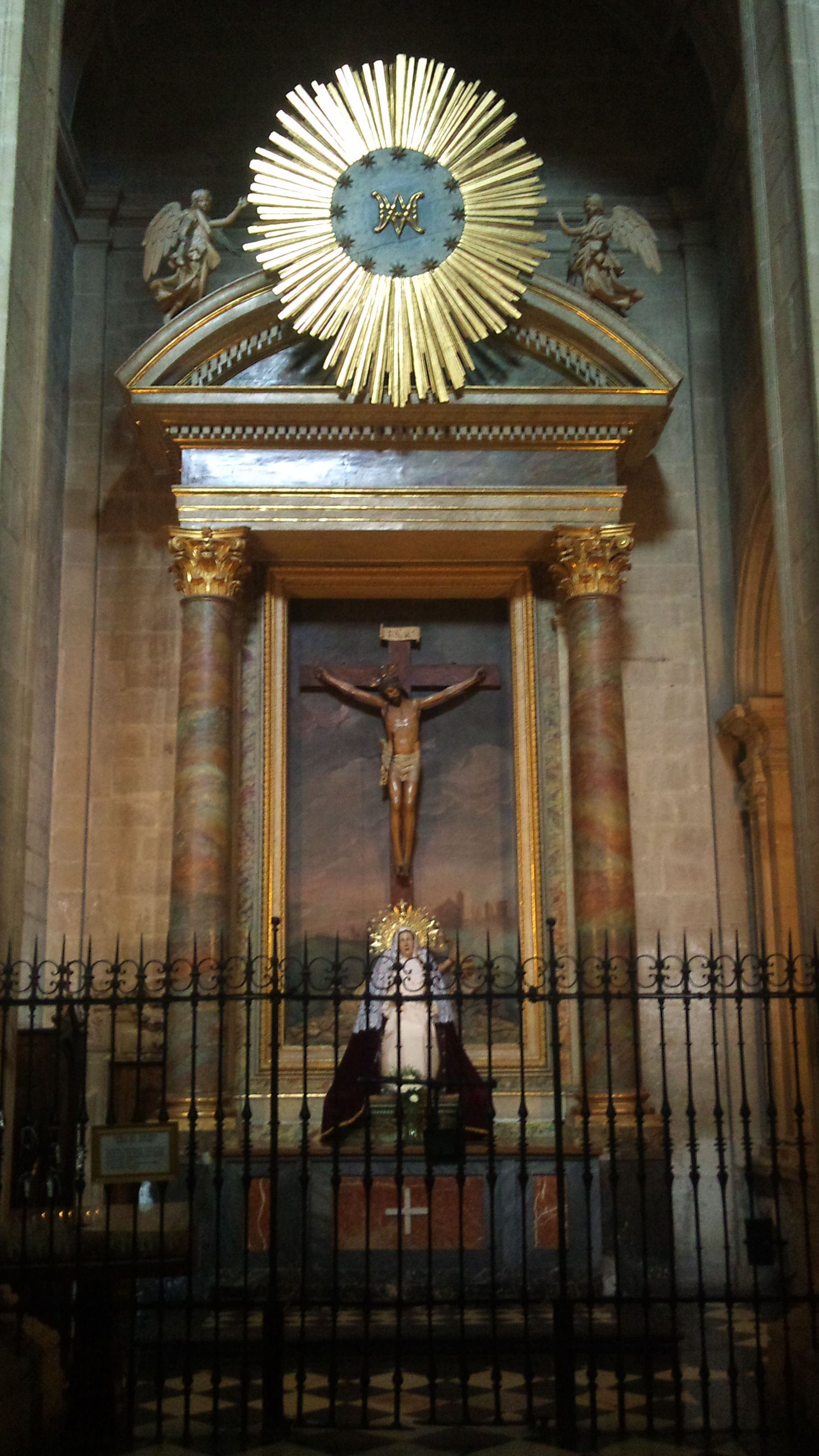 Capilla de la Virgen de la Correa en la Catedral de Jaén. La Virgen de la Correa se encuentra a los pies del crucificado Cristo del Refugio.